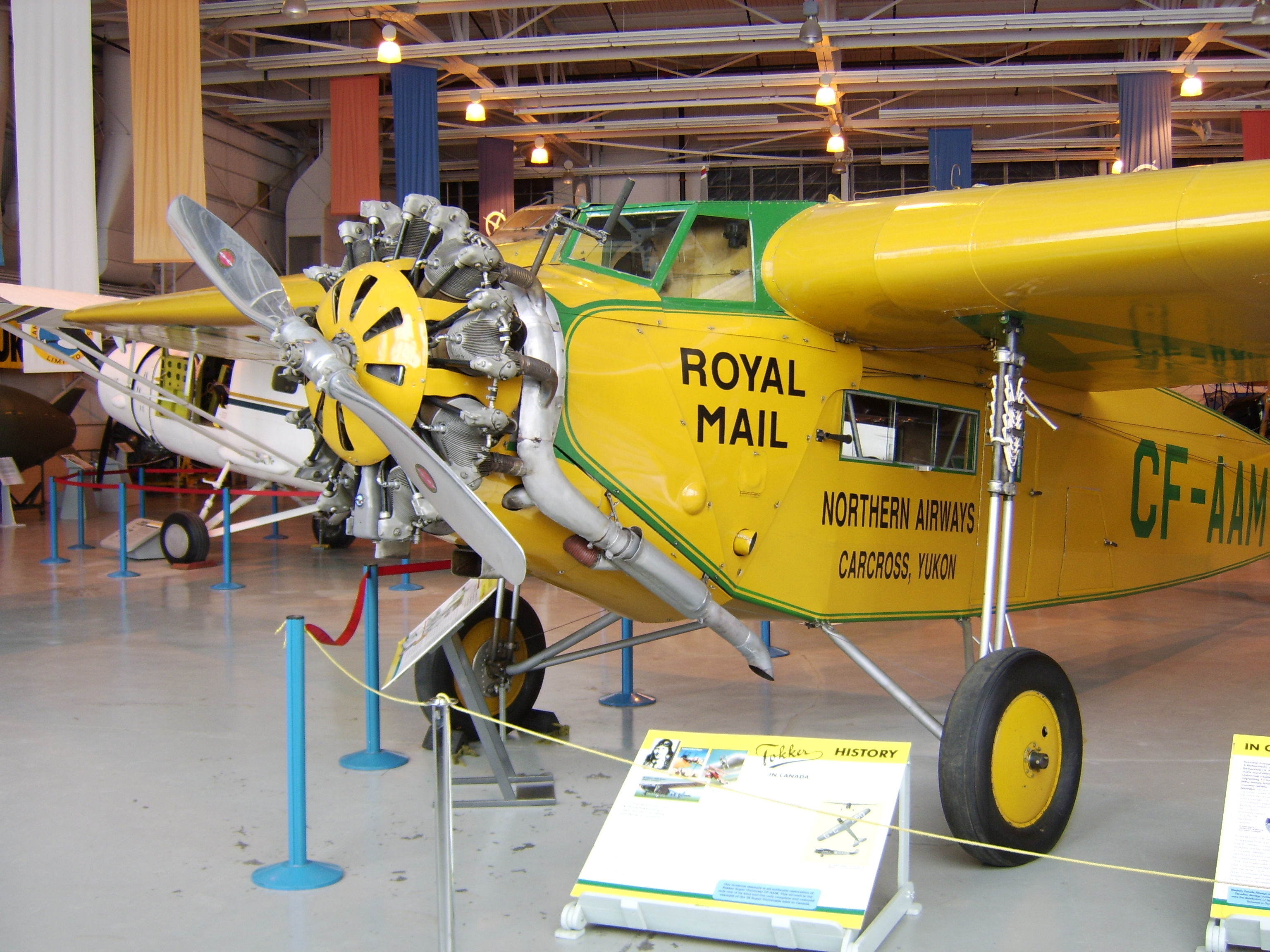 Fokker Super Universal (WCAM)